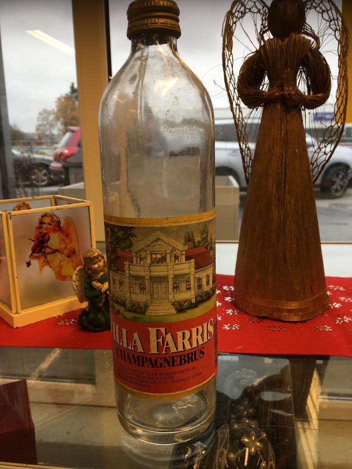 Villa Farris fra Arendals bryggeri